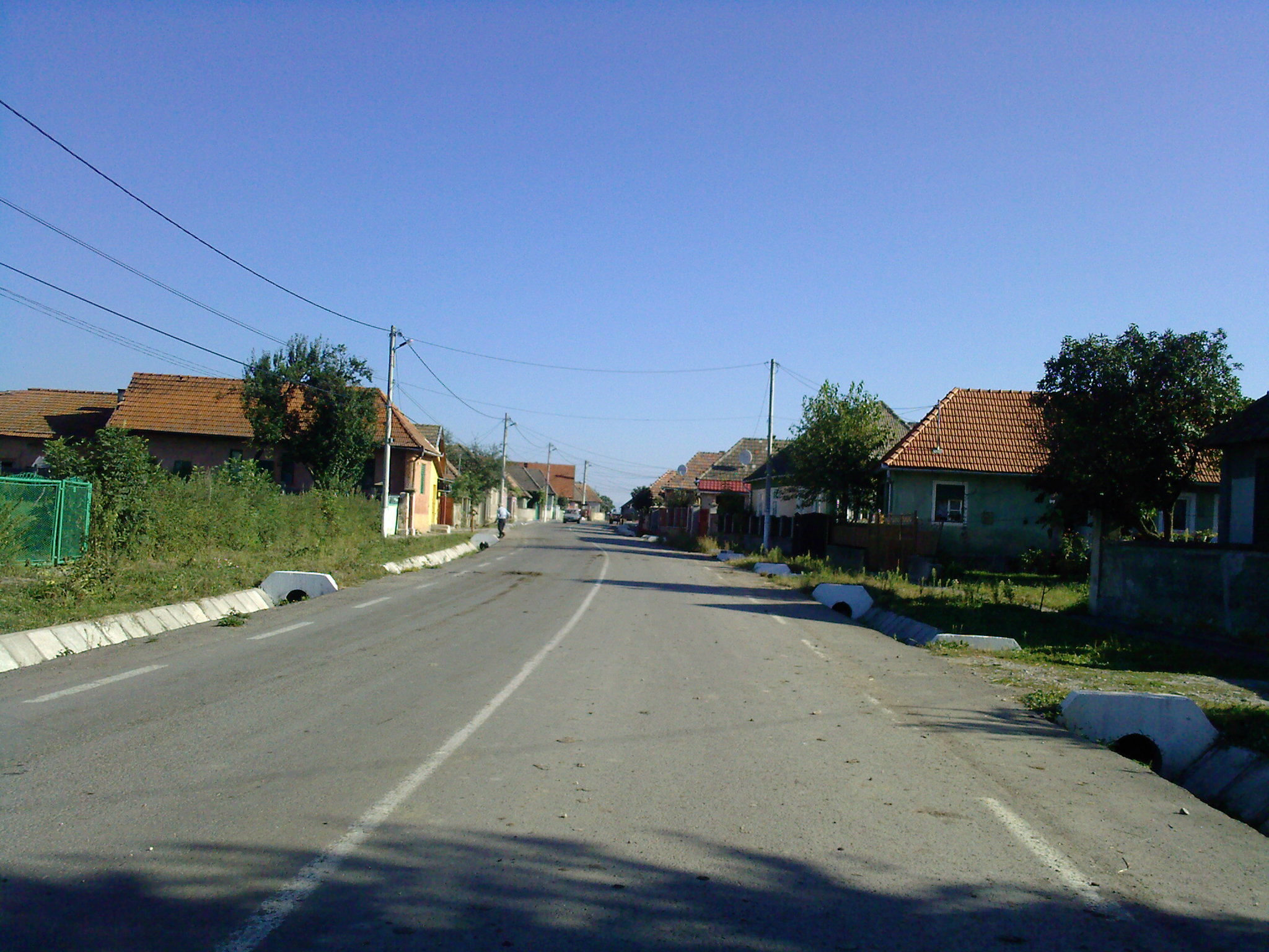 Localitatea Chichiș, județul Covasna.